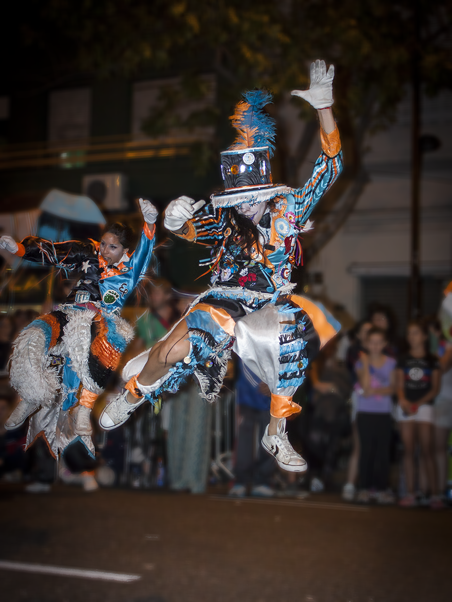 Demostración de baile murguero de la Murga Piantados del Arrabal, provenientes del Barrio porteño de Parque Avellaneda, durante la exhibición en el corso de Boedo en las jornadas de carnavales porteños en Buenos Aires, Marzo 2014.